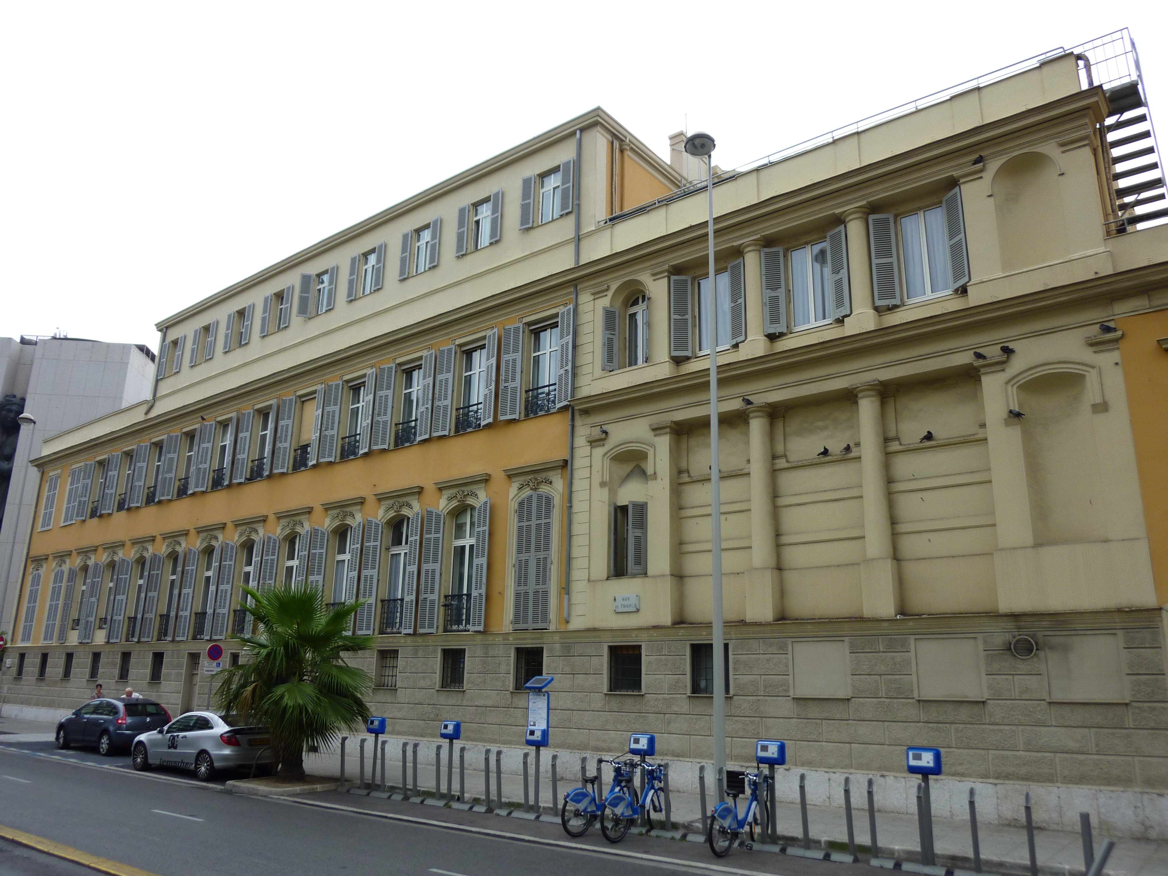 Vue de la Villa Furtado-Heine. Nice, Alpes-Maritimes, France. .